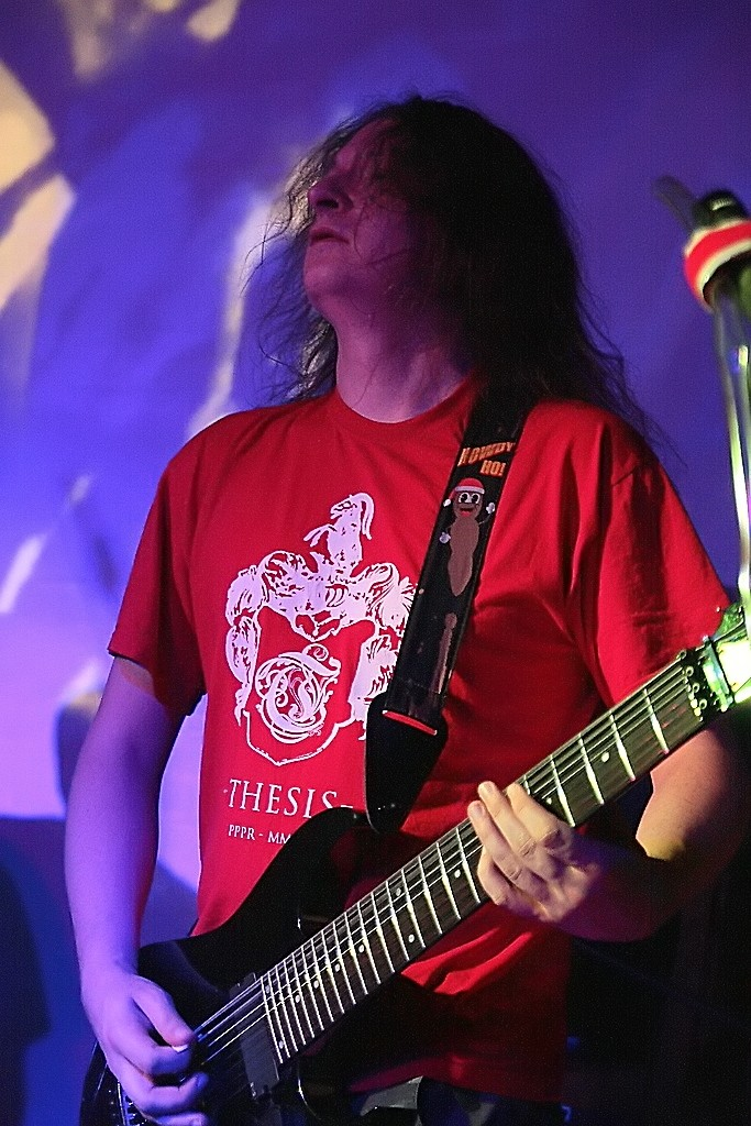 Thesis - Jan Rajkow-Krzywicki